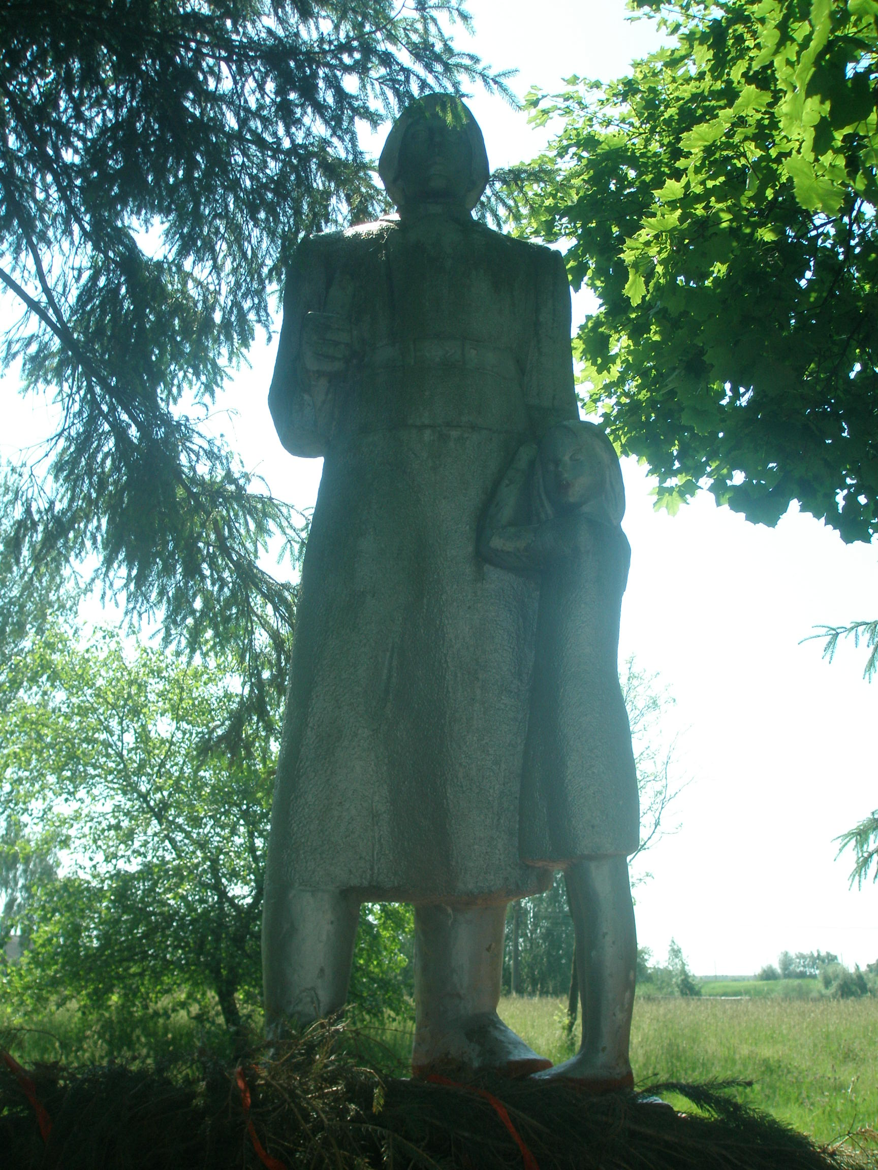 Пам'ятний знак воїнам-односельчанам у с.Весняне Корецький район